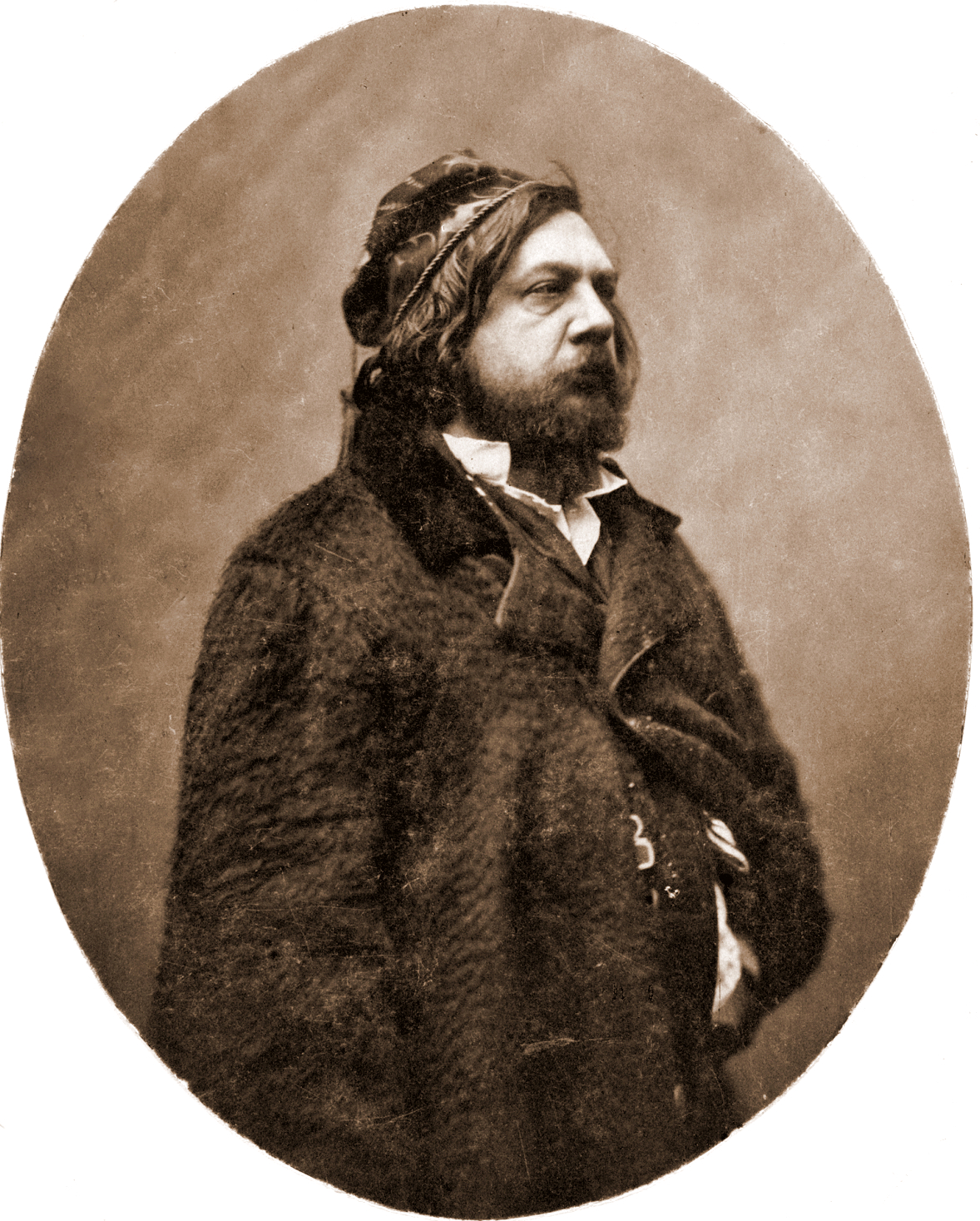 Portrait of Théophile Gautier